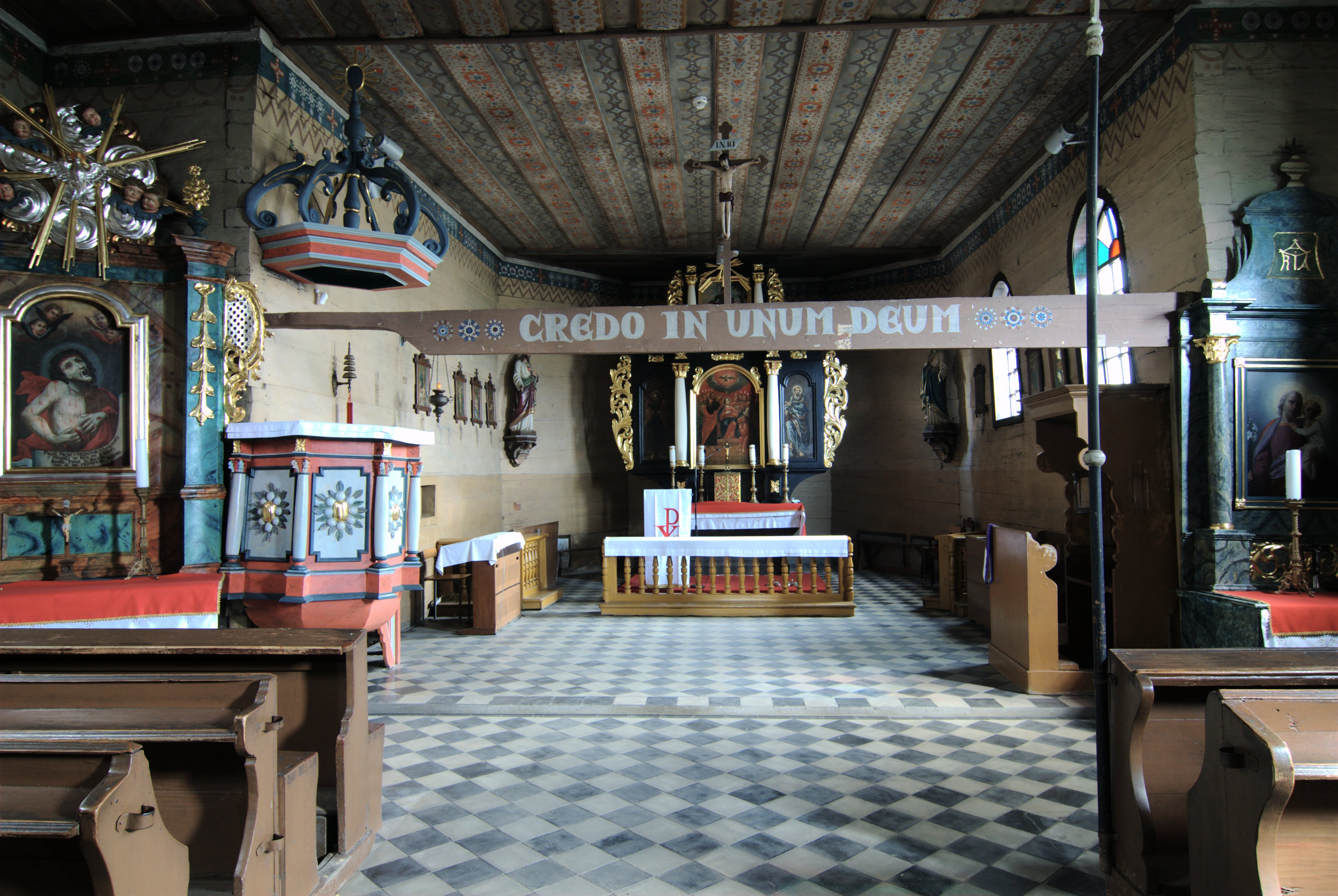 Bojszów, kościół fil. p.w. Wszystkich Świętych, XVII